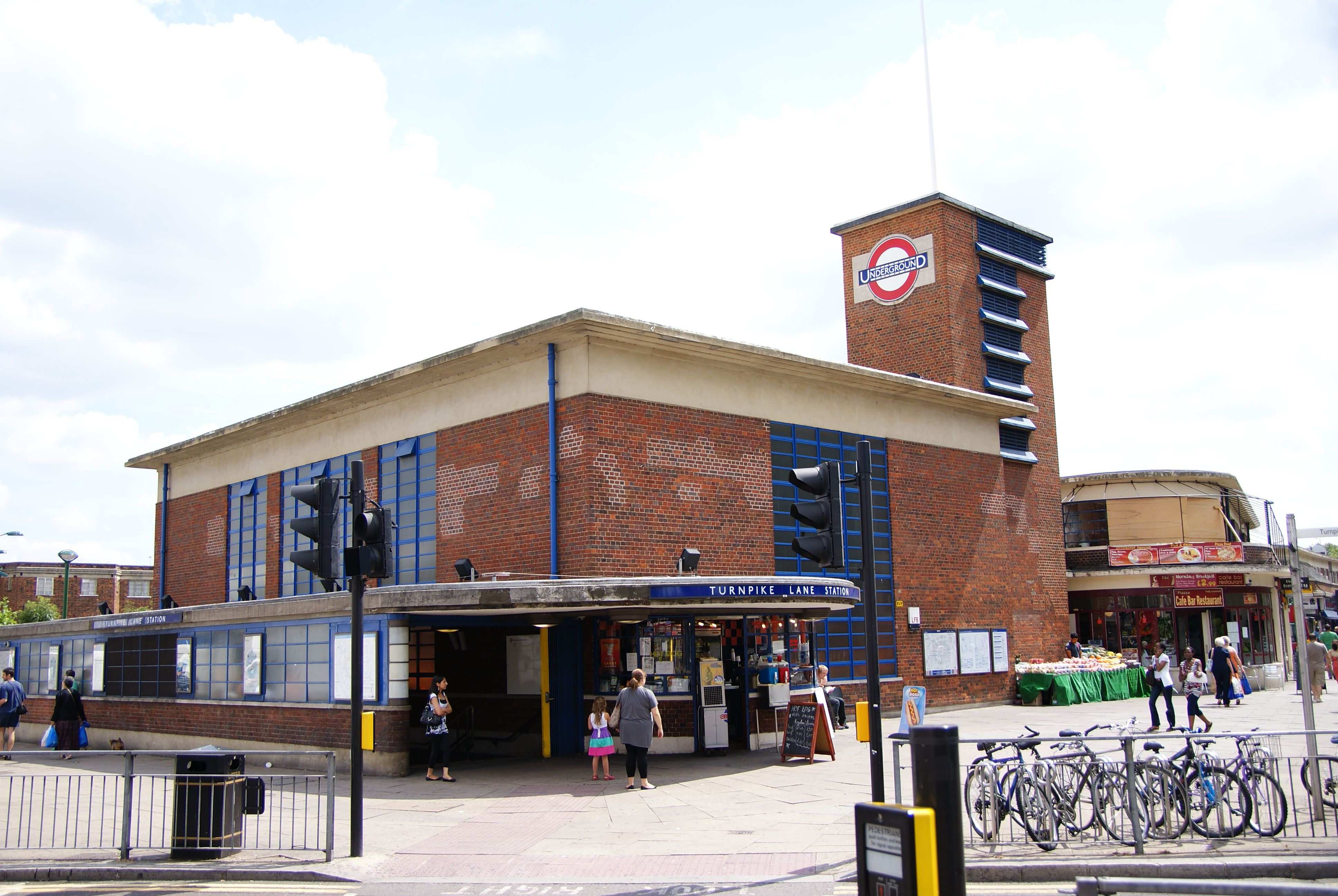 TURNPIKE LANE-06 240710 CPS